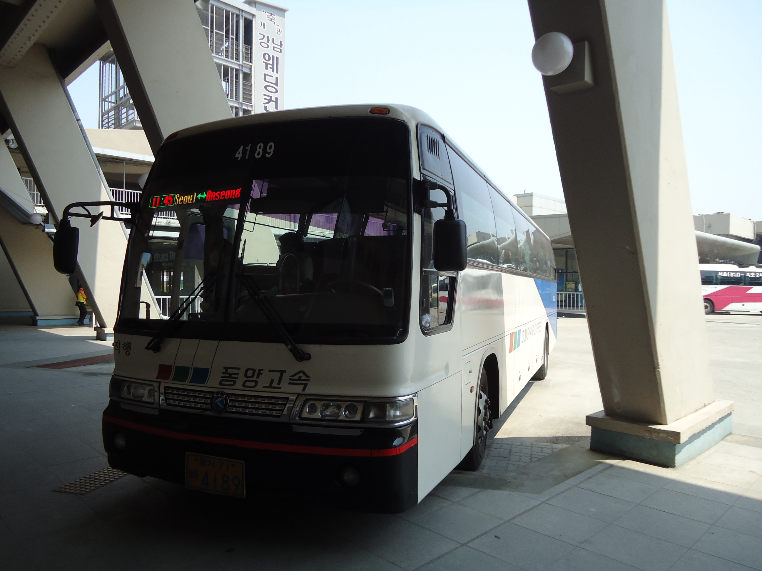 동양고속 그랜버드 HD 블루스카이(서울→안성)